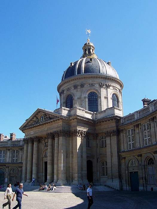 Parigi - Institut de France